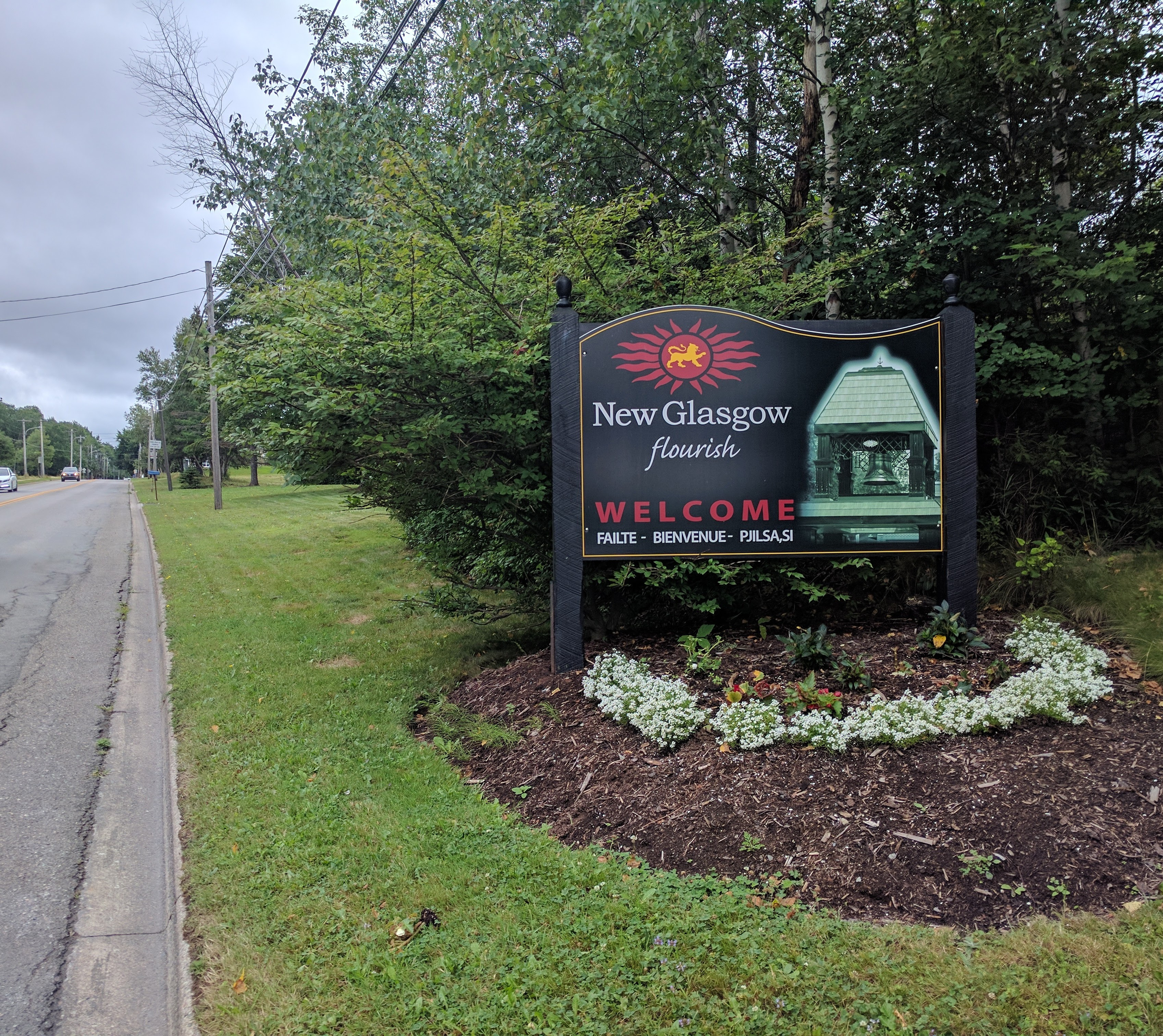 New Glasgow